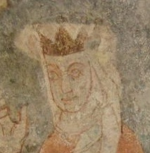 Richza Česká